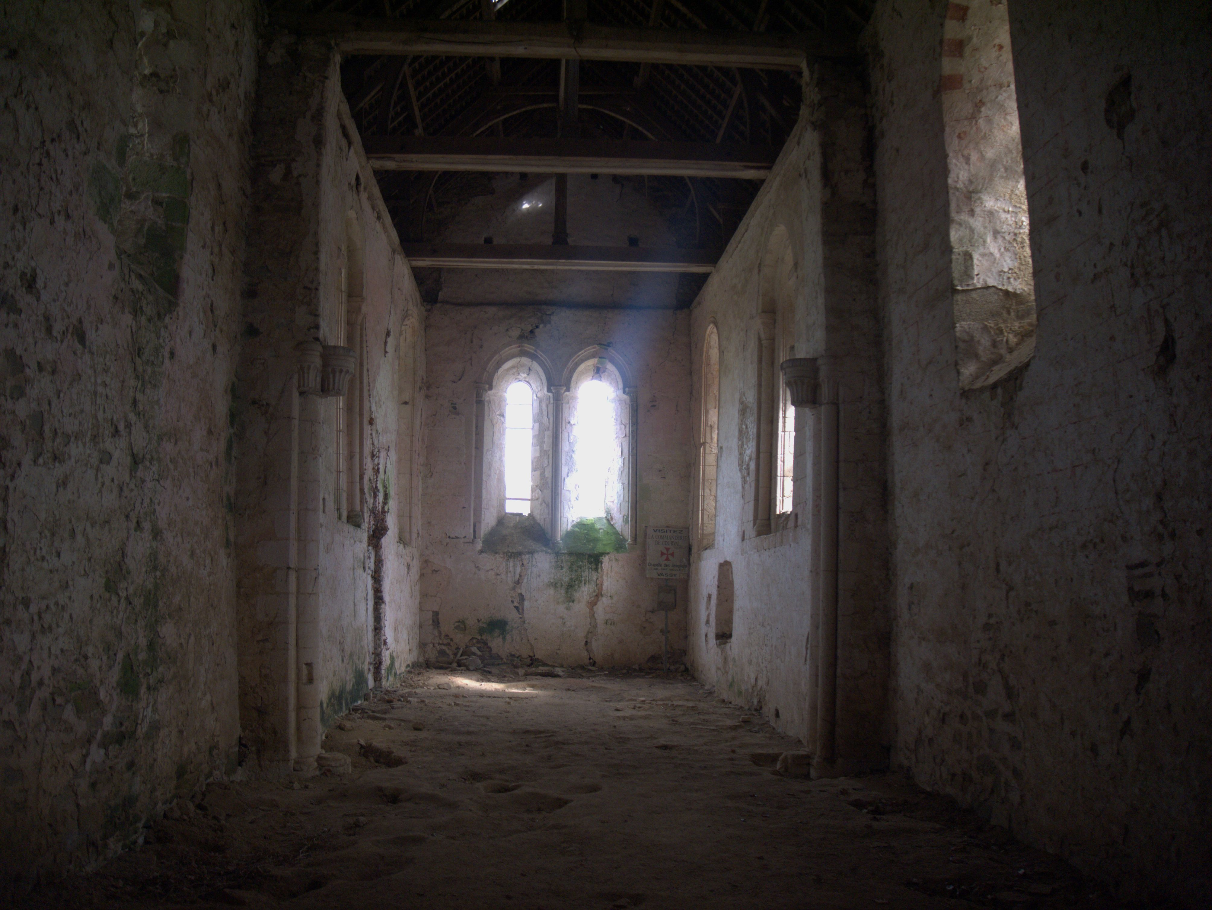 Chapelle de la commanderie de Courval